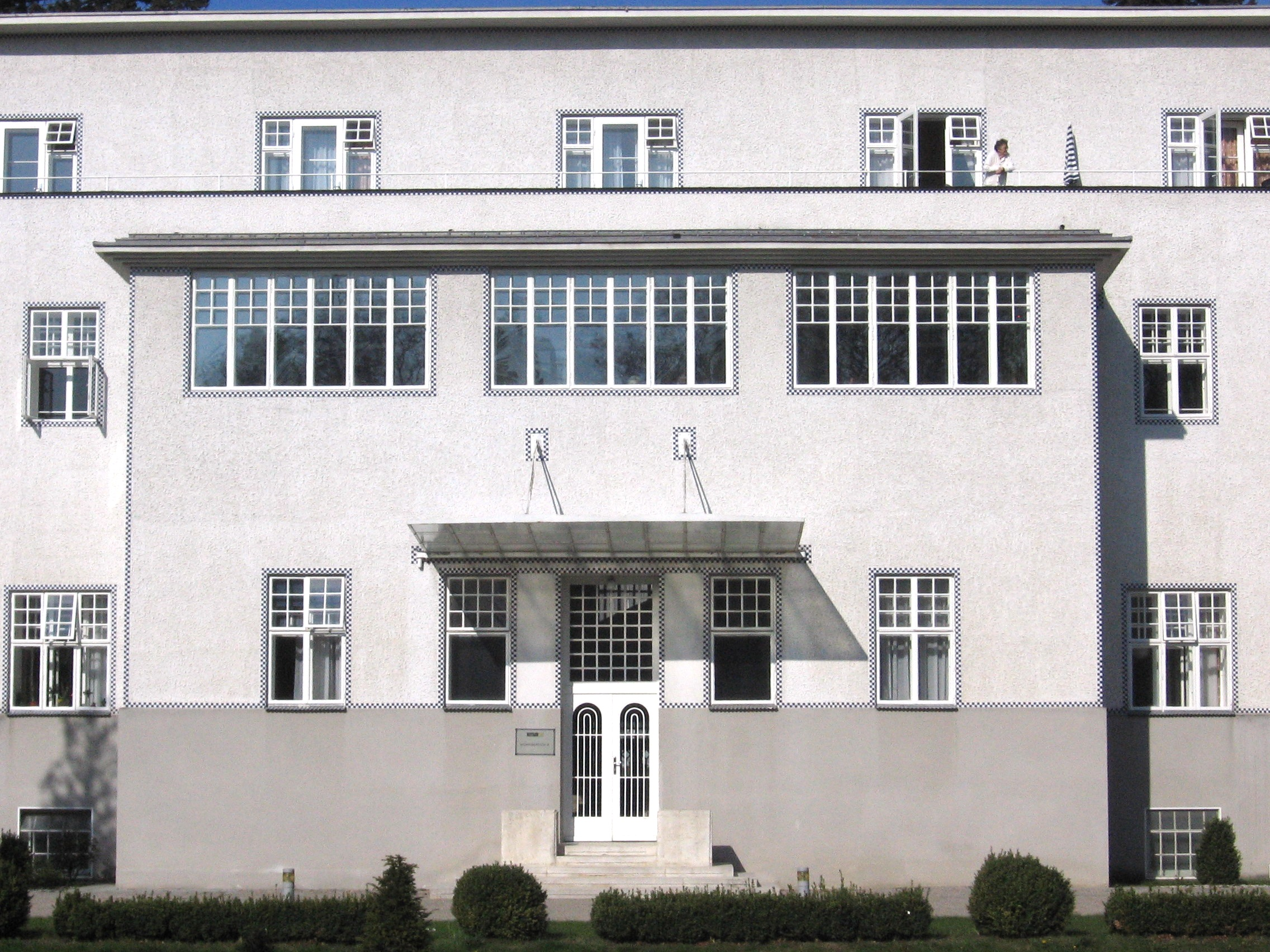 Sanatorium Purkersdorf).